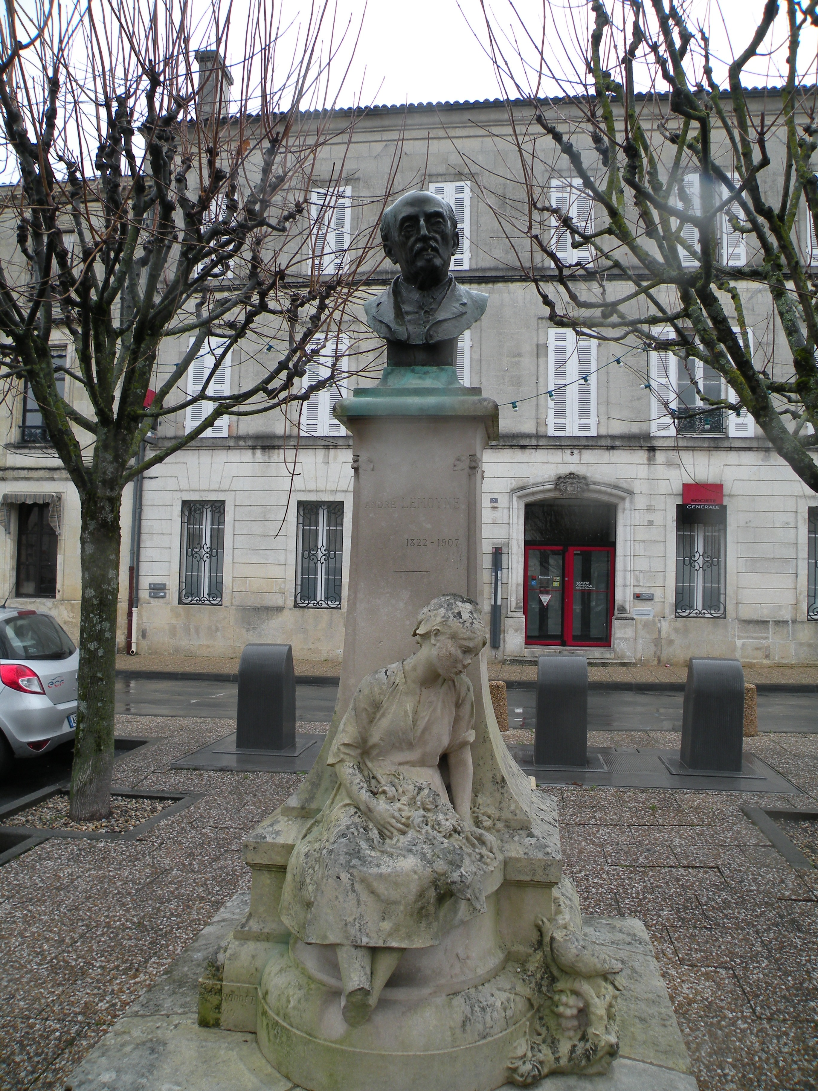 Statue du poète André Lemoyne à Saint-Jean-d'Angély (le buste est de Pierre-Marie Poisson, la fillette est l’œuvre d’Émile Peyronnet). Object location45° 56′ 43.88″ N, 0° 31′ 24.17″ W